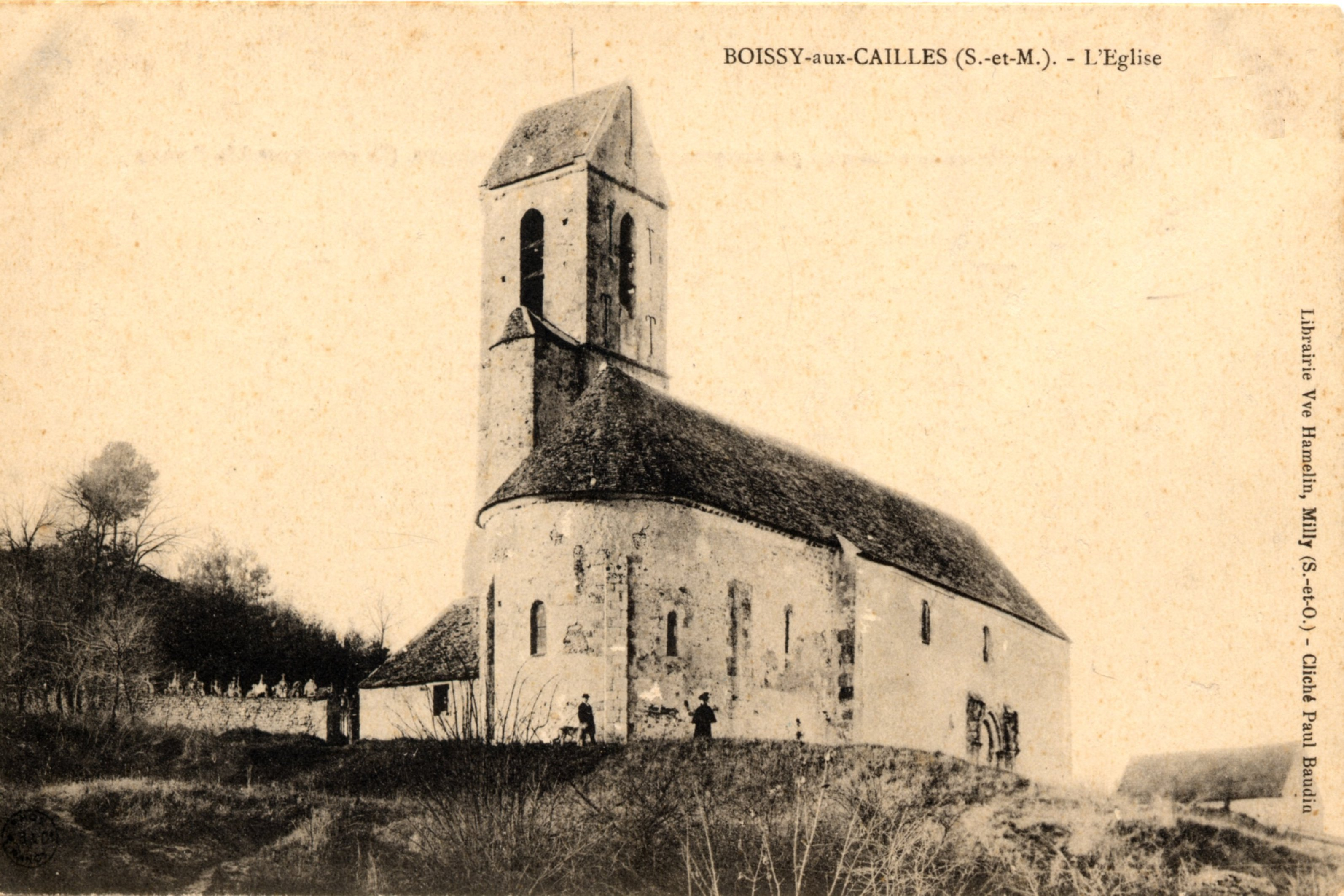 Eglise St Martin